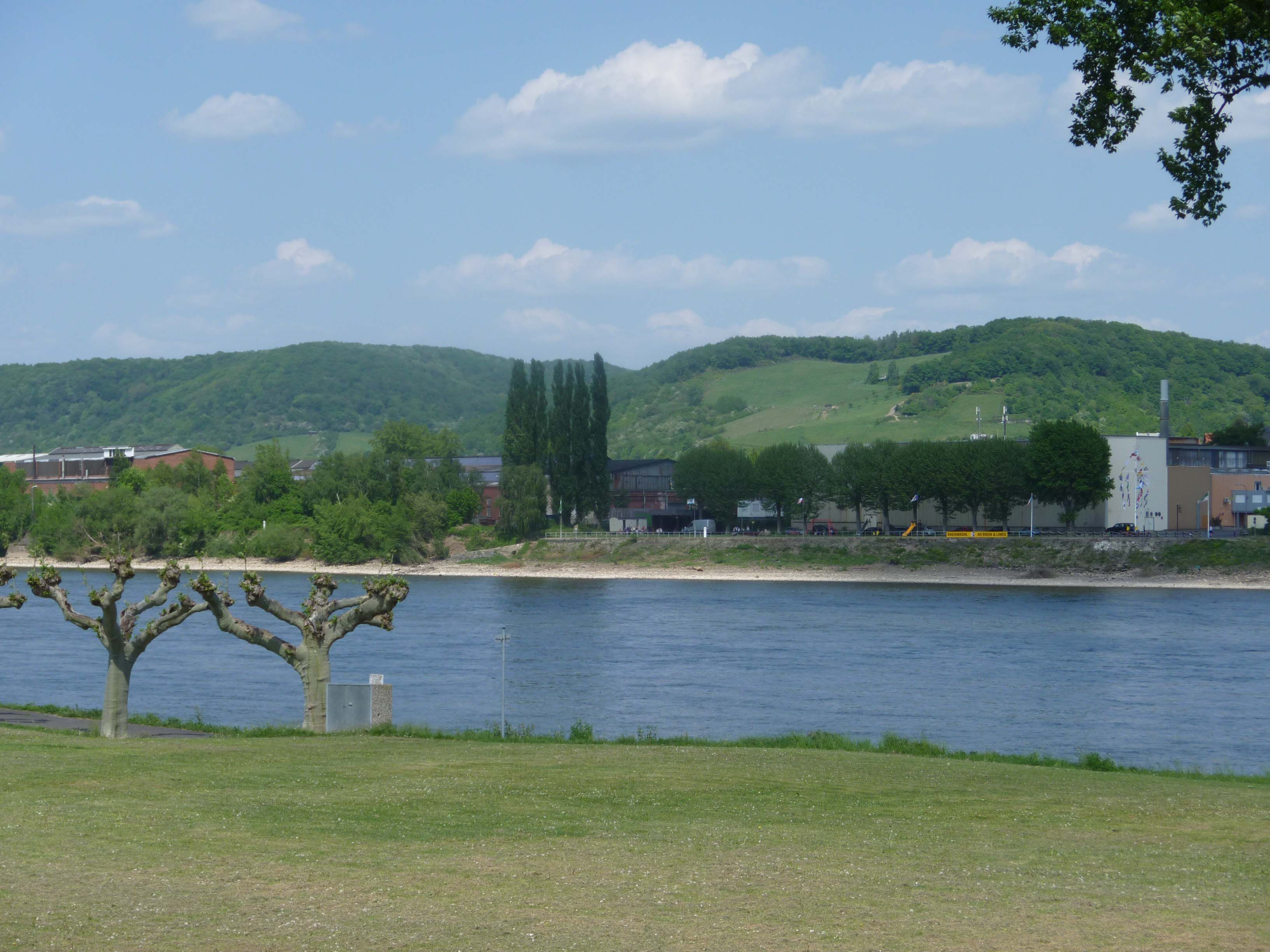 ehemaliges Werksgelände Hilgers Werft Rheinbrohl